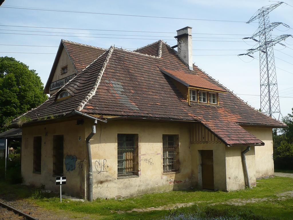 Ludwikowice Kłodzkie